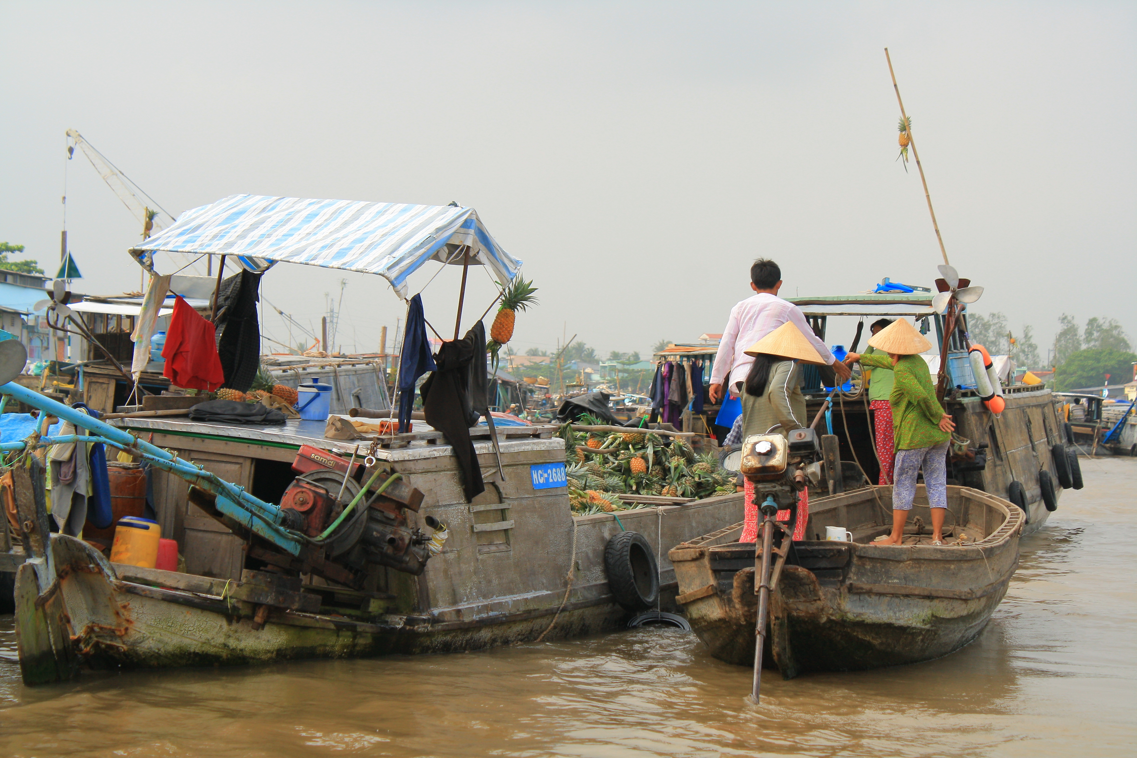 Cai Rang Floating Market